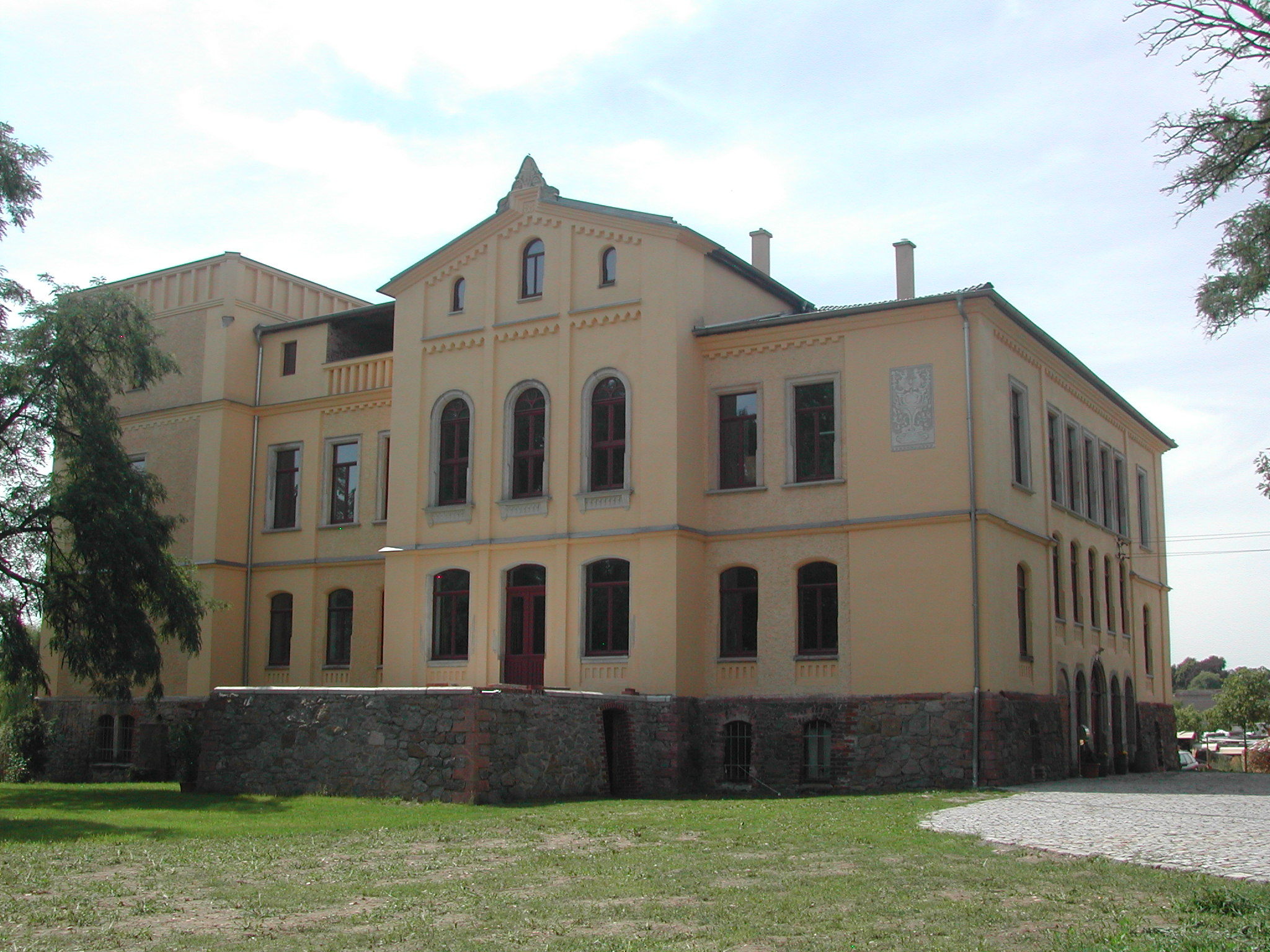 Schloss Altenhain